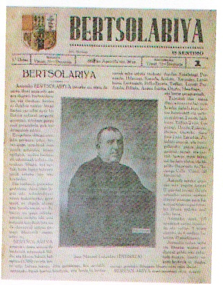 Bertsolariya aldizkaria